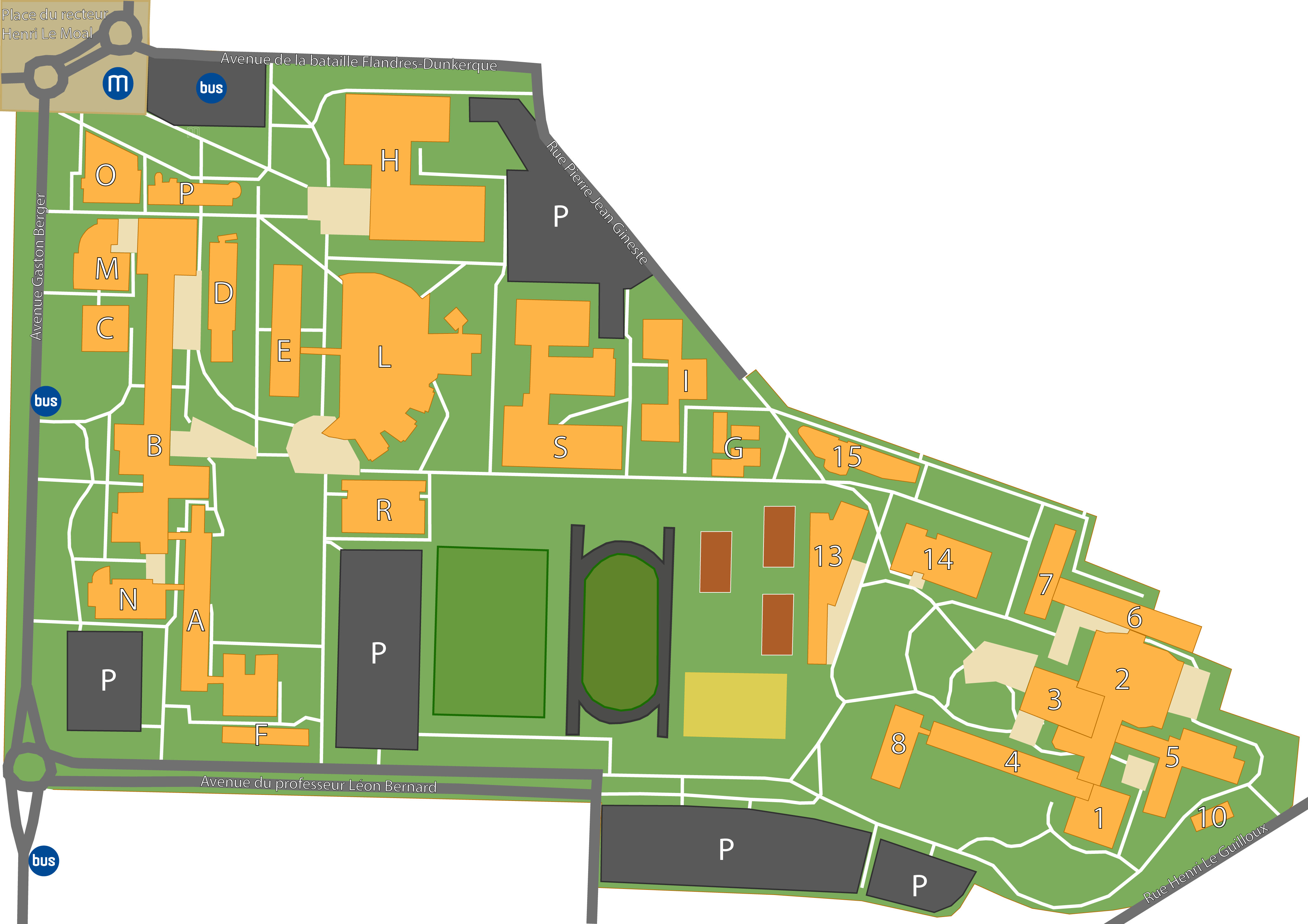 Plan du Campus de Villejean - Université de Rennes